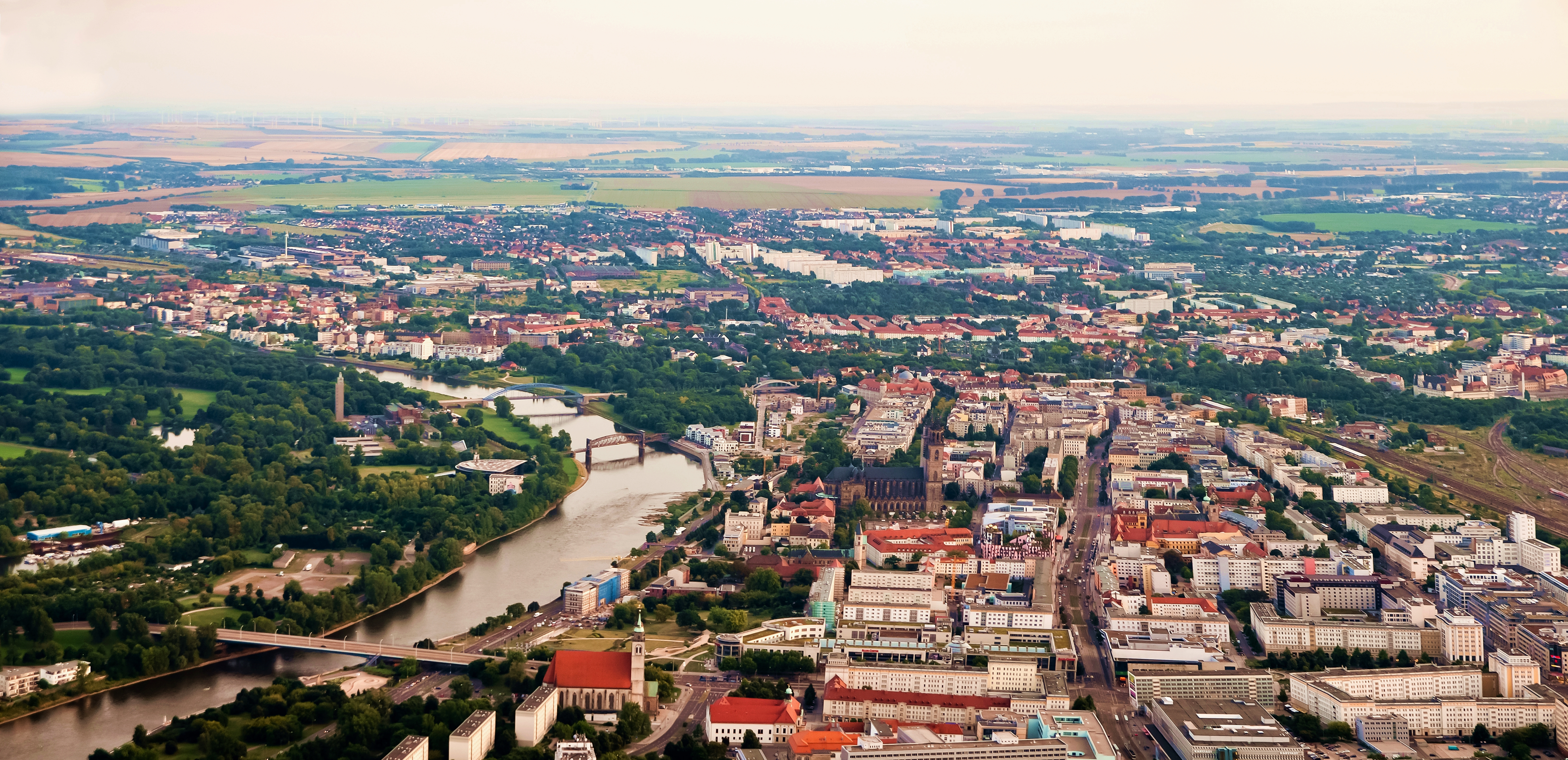 Blick aus einem Ballon über die Altstadt von Magdeburg